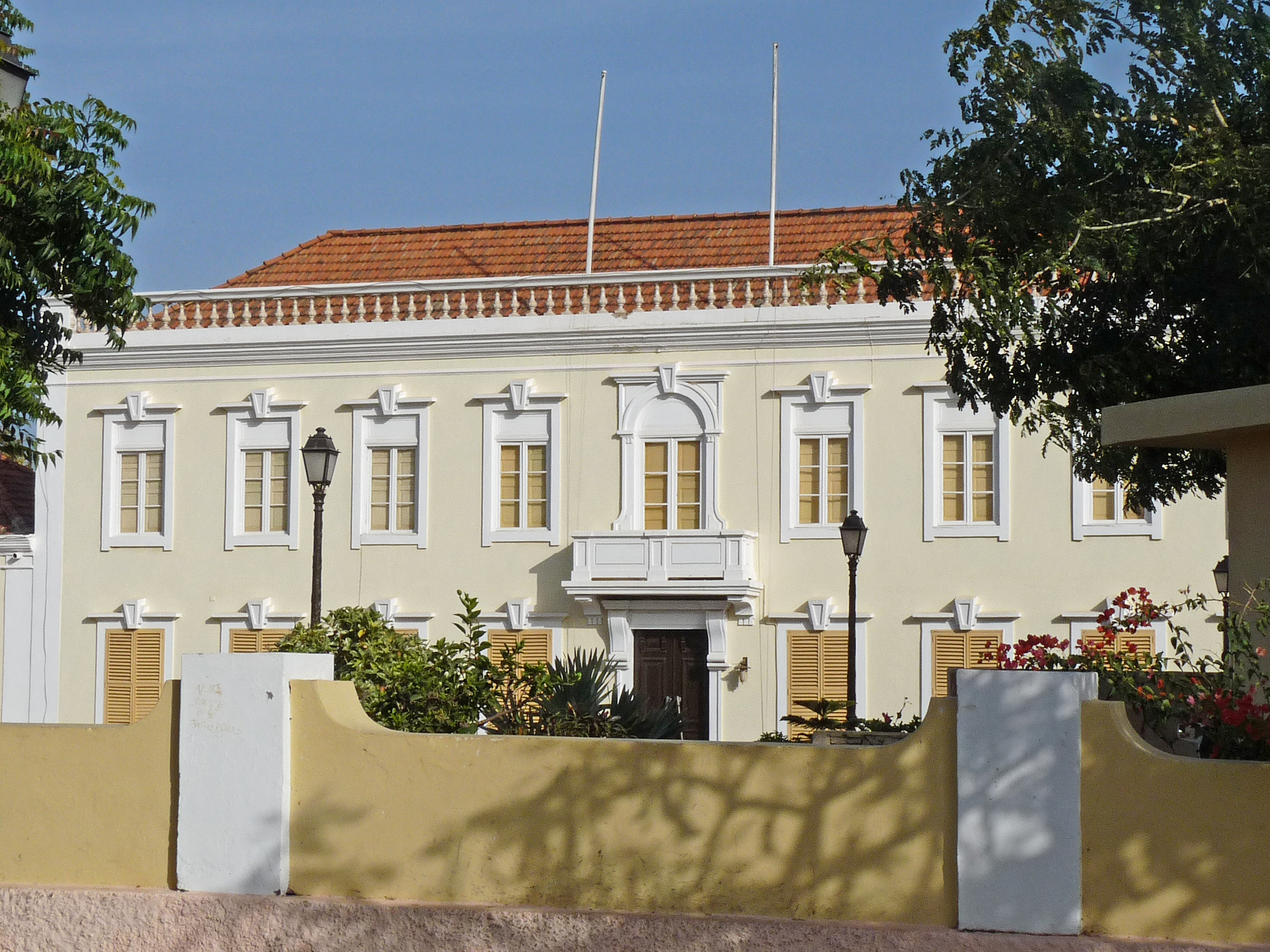 Praia (Cap-Vert) : Palais présidentiel